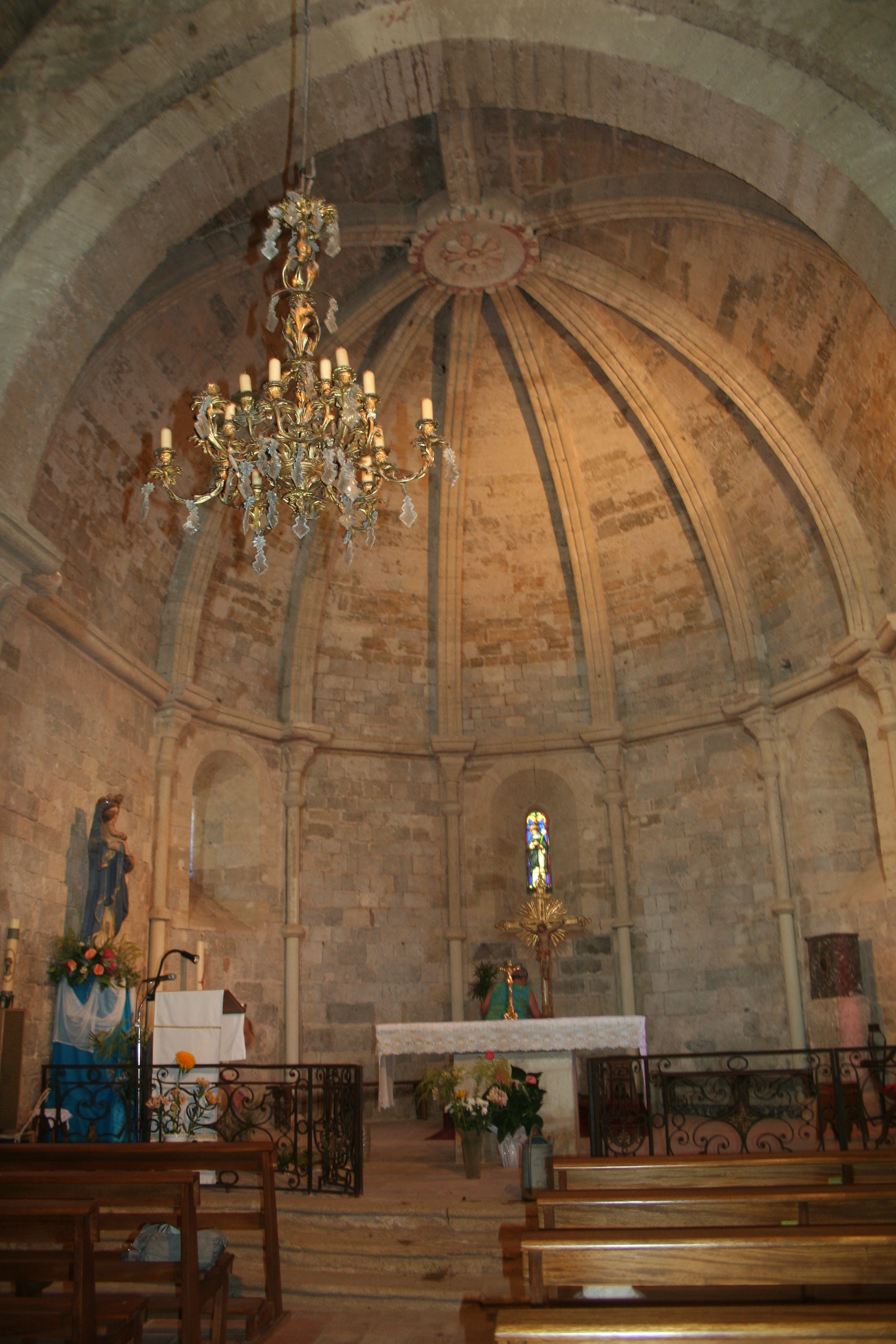 Paulhan (Hérault) - Église romane Notre-Dame des Vertus - abside